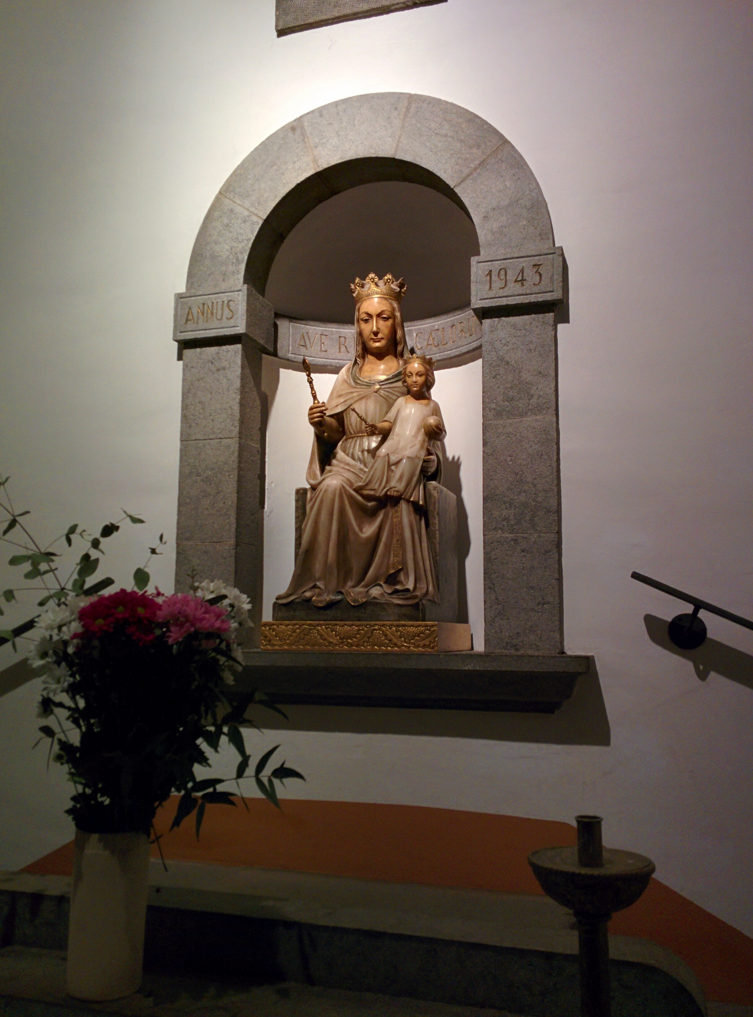 Església parroquial de Sant Llorenç (Maçanet de la Selva)